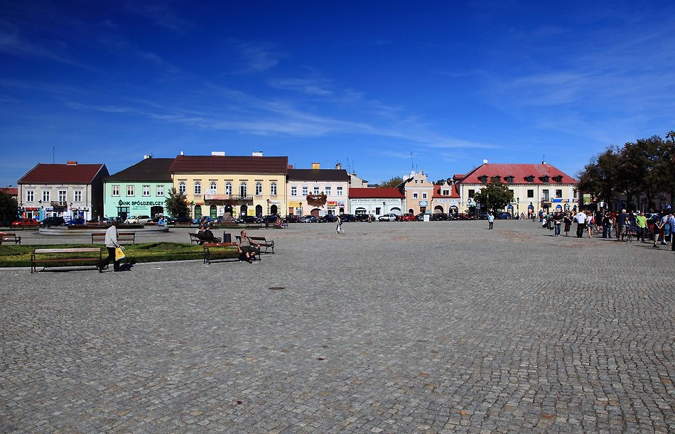 Nowy Rynek w Łowiczu